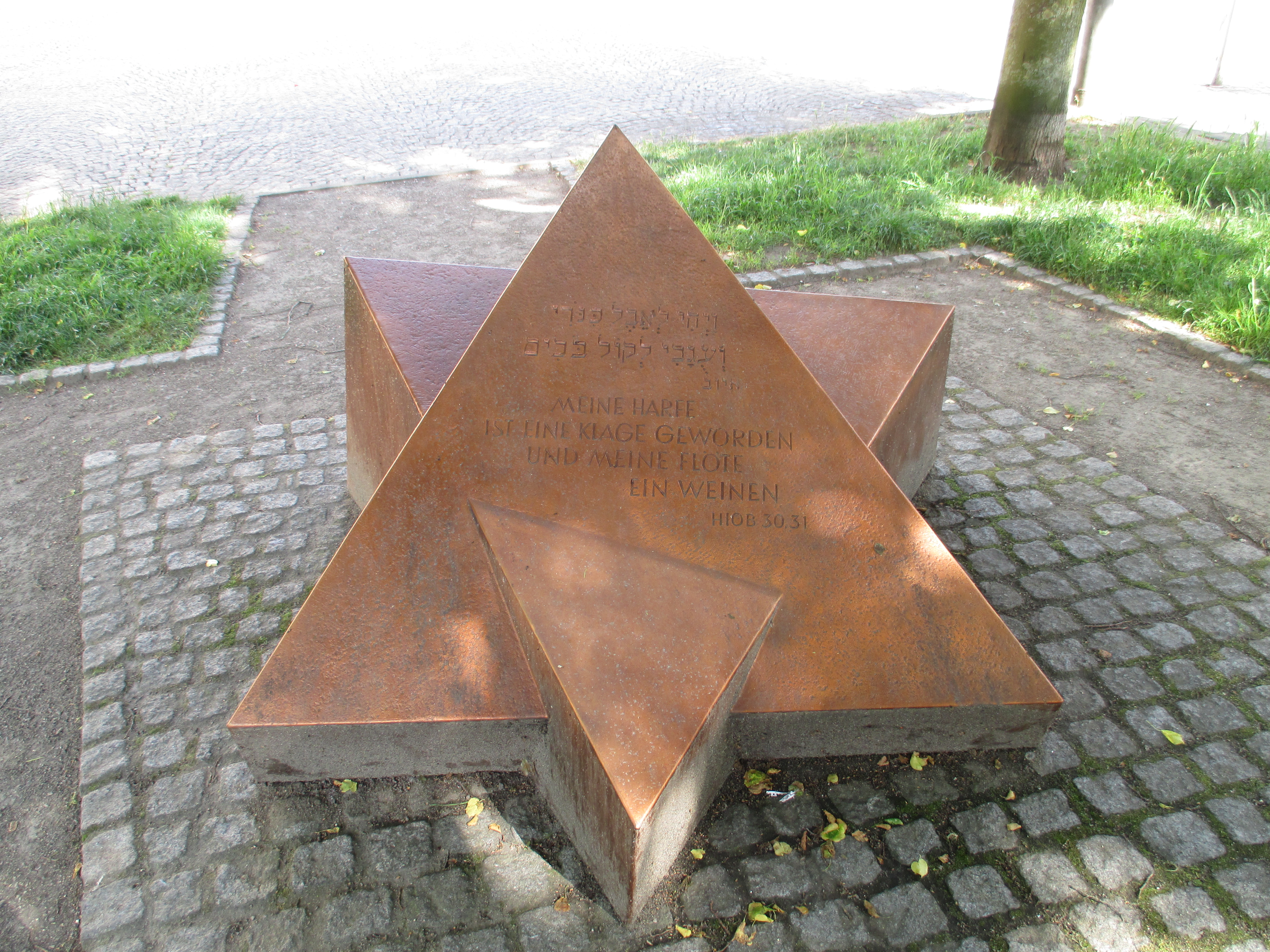 Das "Mahnmal zur Erinnerung an die ermordeten Weseler Bürger jüdischen Glaubens" (1988) erinnert an die Pogromnacht im Jahre 1938 und der Zerstörung der Synagoge in der Nähe des Willibrordi-Doms. Erstellt wurde es von dem Xantener Künstler Hans-Joachim Gramsch.